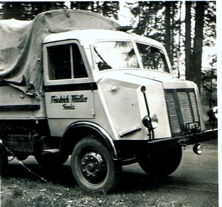 Horch H3 mit Fahrerhausvariante (rechtliche Gründe)